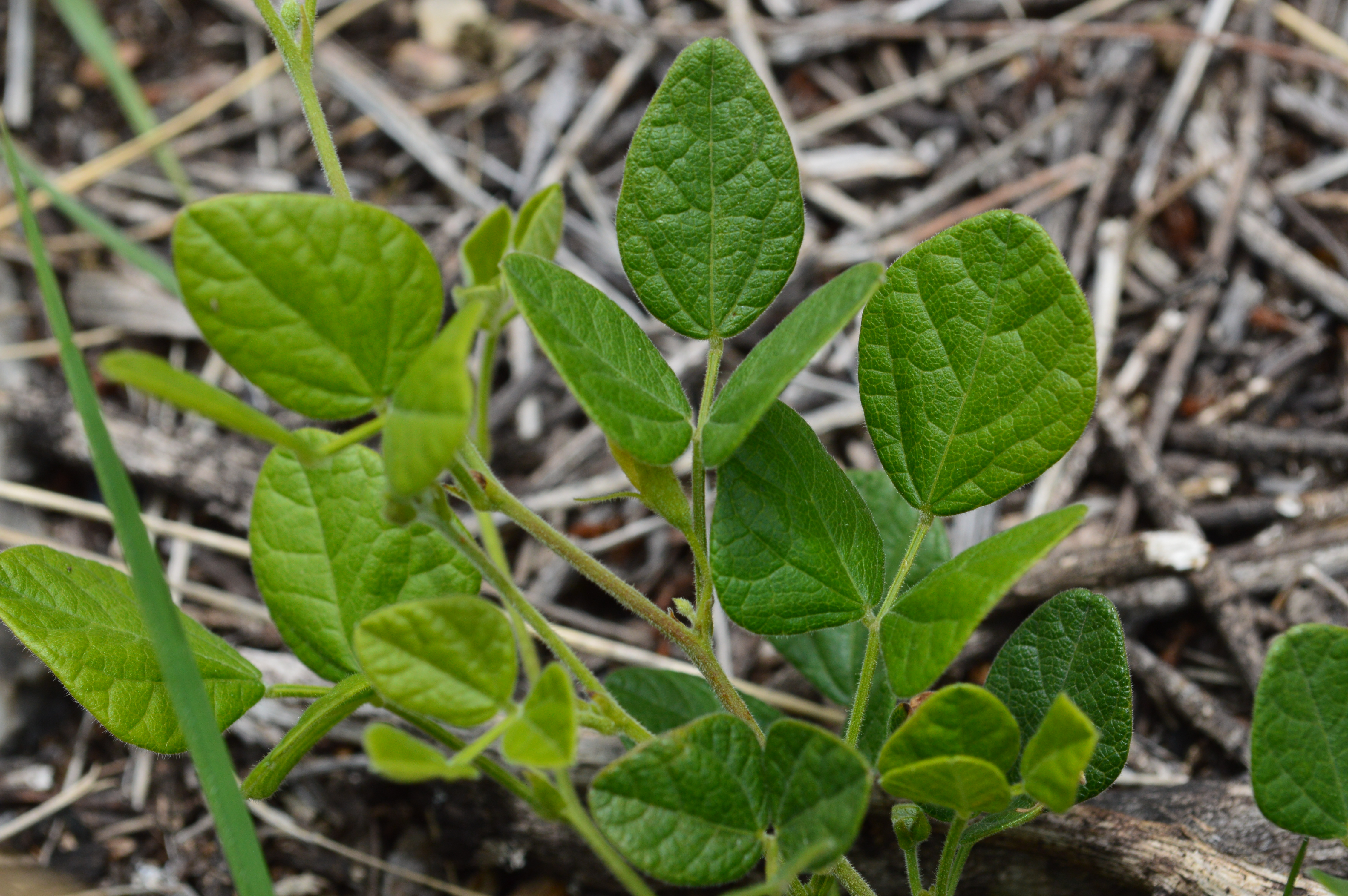 Manayupa (Desmodium molliculum) en el cerro Huacatuna, distrito de Masin. Foto tomada durante el IV Festival Masintin a finales de octubre de 2019.